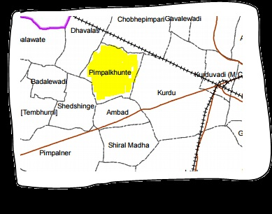 पिंपळखुंटे नकाशा